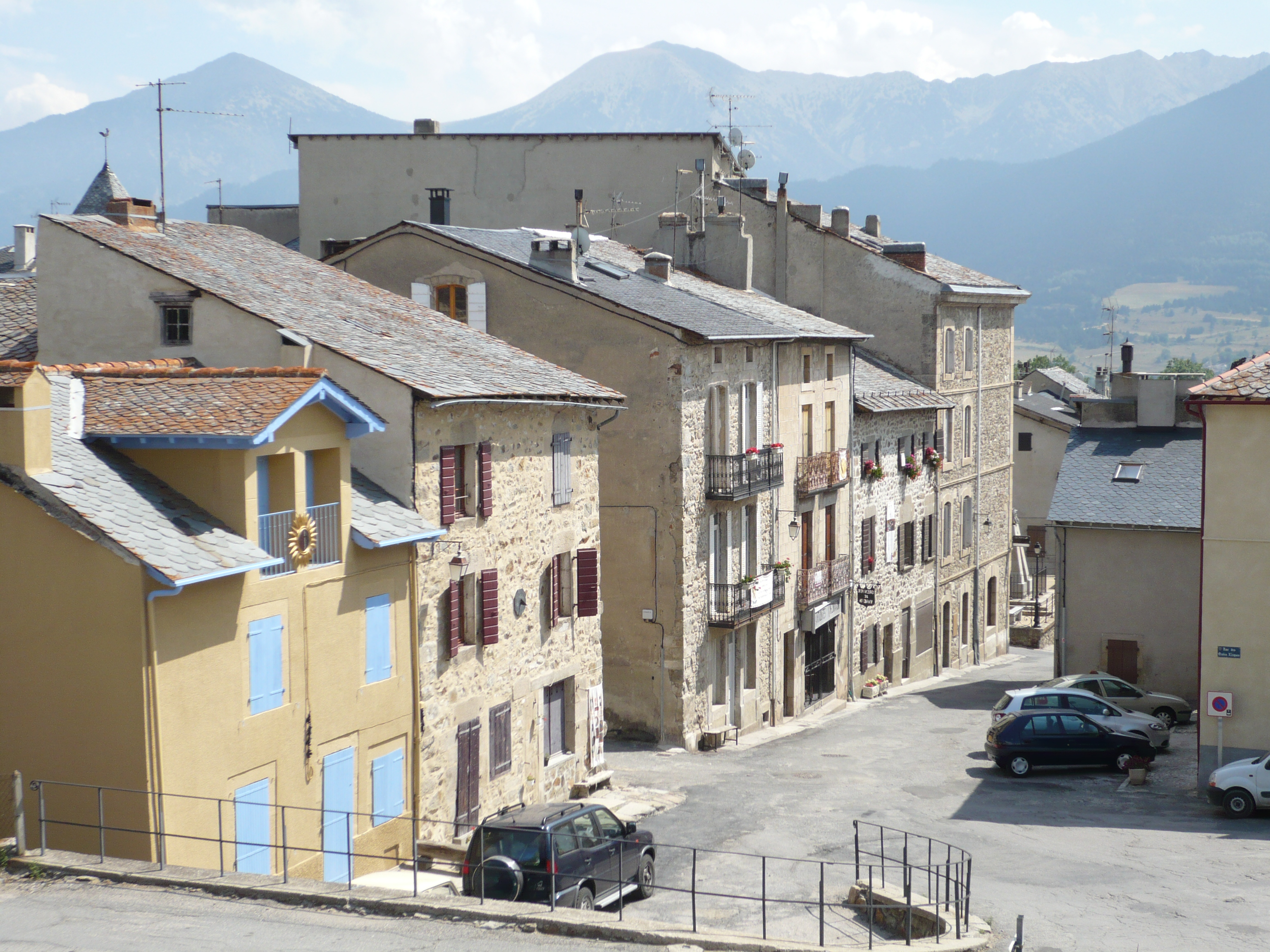 Mont Louis